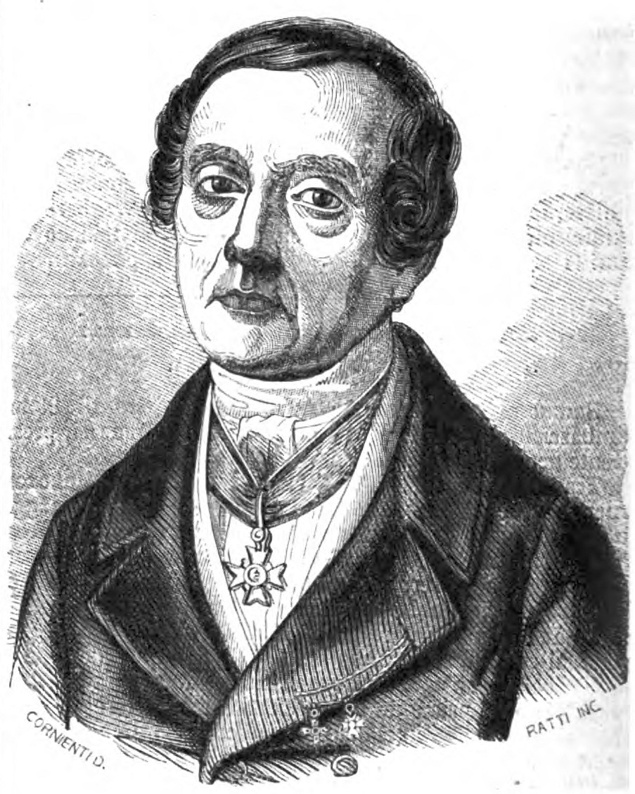 Antonio Mazzarosa